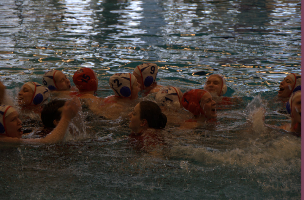 ZVL bekerkampioen waterpolo seizoen 2011-2012